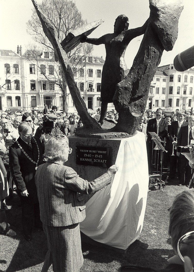 CollectieCollectie Fotoburo de BoerInventarisnummerNL-HlmNHA_54021413BeschrijvingPrinses Juliana onthult het beeld van Hannie Schaft in het Kenaupark. Geschonken in 1983 door B en W. Ver. Haerlem Jaarboek 1982, blz. 172. United Photos de Boer bv. - Negatiefnummer 21862 K 18 AFotonummerKNA006013452AnnotatiesB043 54/55-022 3095LandNederland ProvincieNoord-Holland GemeenteHaarlem PlaatsHaarlem StraatKenaupark Begindatum03-05-1982Einddatum03-05-1982Datering gebeurtenis03-05-1982TechniekFoto Trefwoordenbeeld, beeldhouwer, beeldhouwkunst, fotograaf, Menger-Oversteegen, Truus, monument, muziekcorps, onthulling, prinses Juliana, Reehorst, Burgemeester, Schaft, Hannie, Tweede Wereldoorlog CopyrighthouderUnited Photos de Boer b.v.